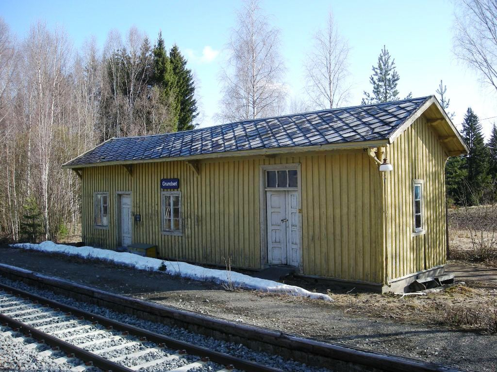 Grundset stasjon på Rørosbanen